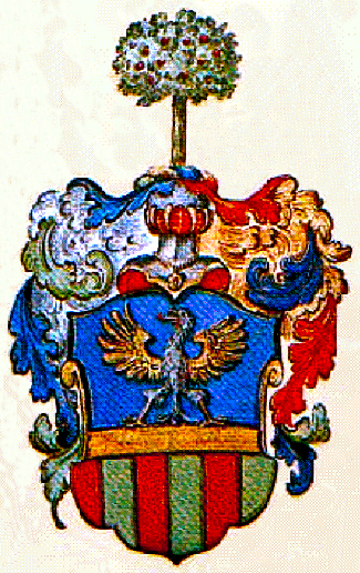 Wappen der Grafen Alberti von Poja im 16. und 17. Jahrhundert